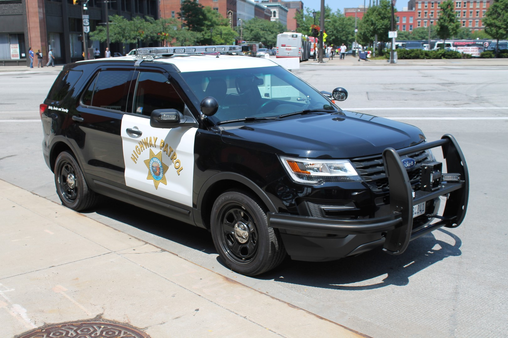 Seen in Cleveland Ohio